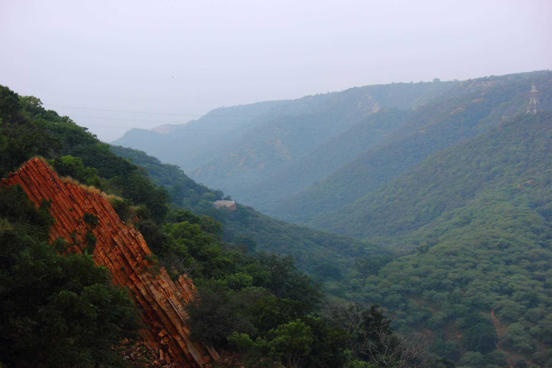 Aravali mountains Rajasthan